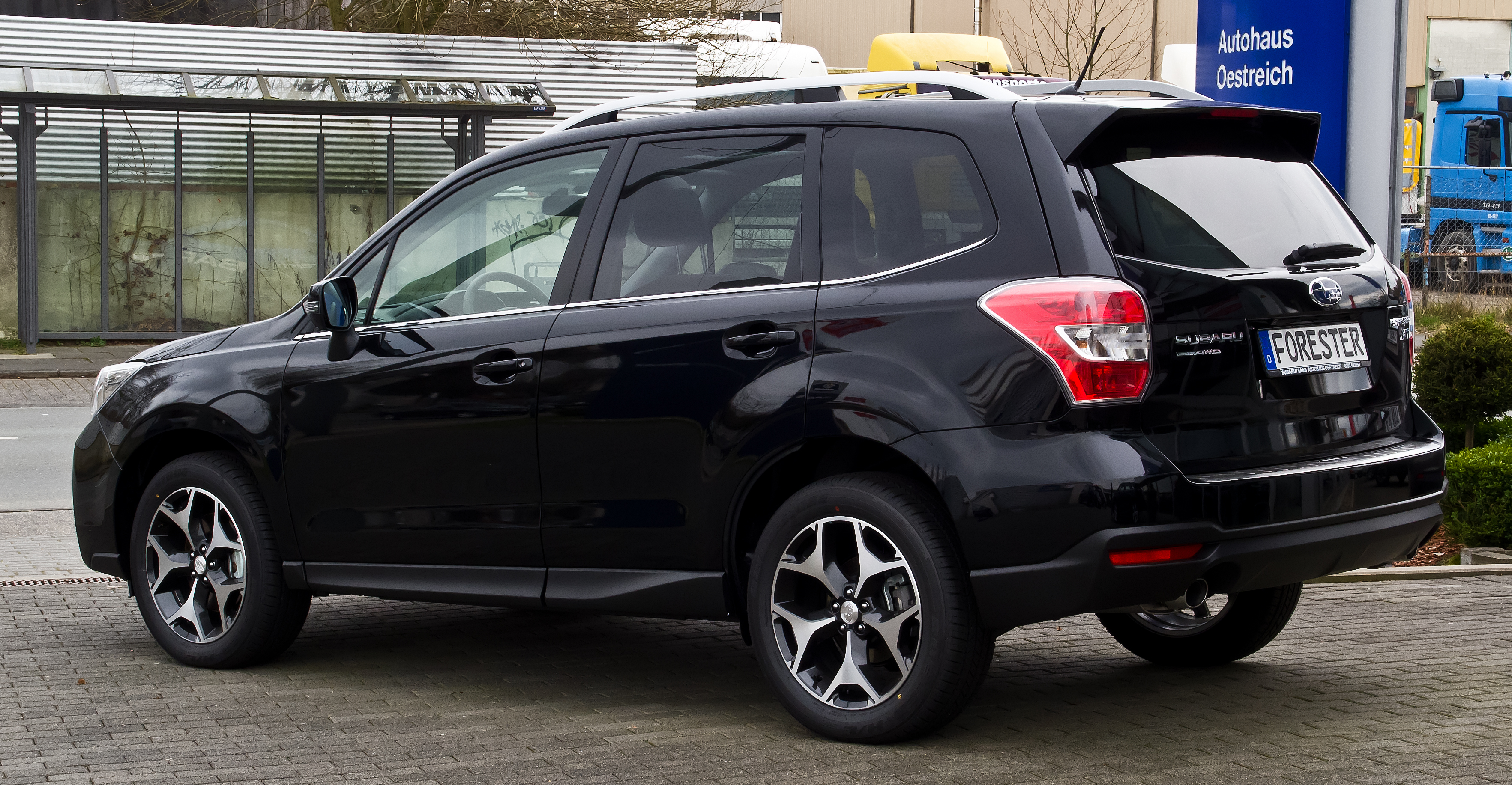 PSubaru Forester 2.0XT AWD Platinum (IV)